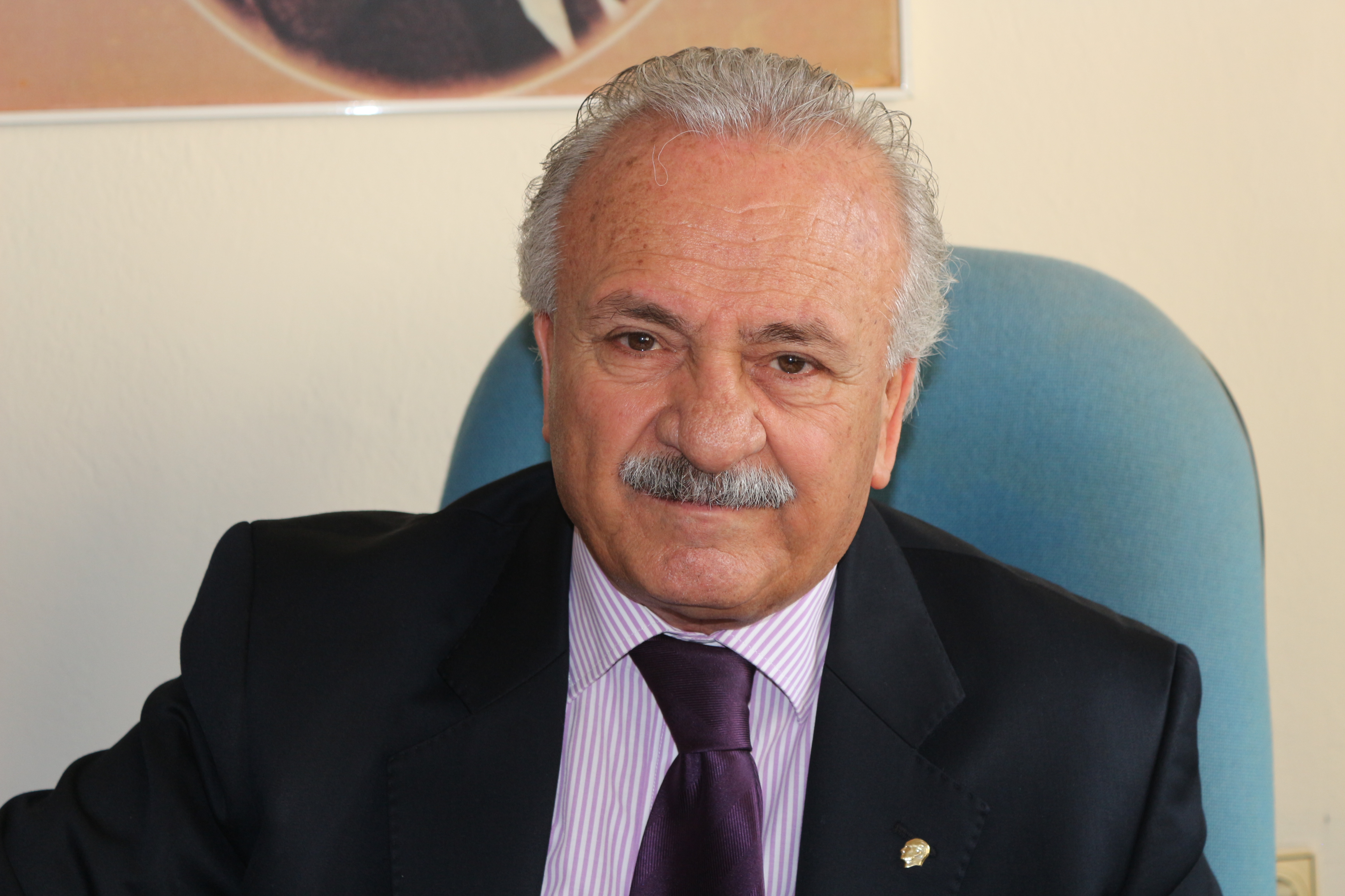 Erol Ertuğrul ile kendi ofisinde gerçekleşen bir röportaj sırasında çekilmiş bir fotoğrafı